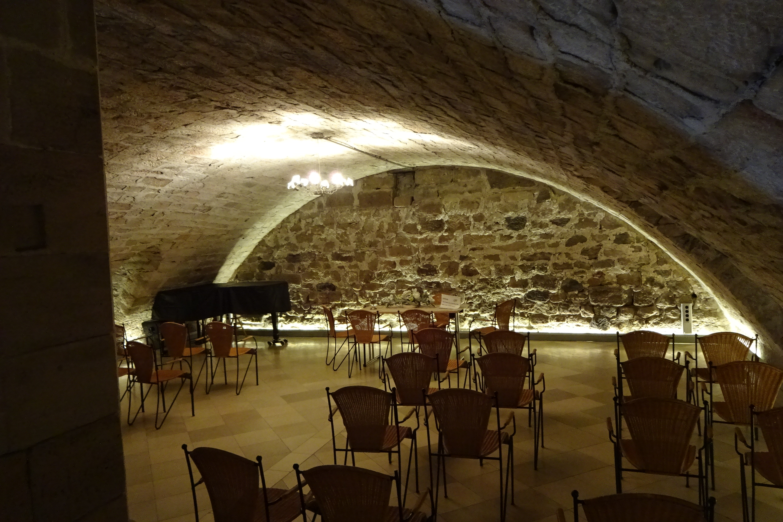 Höchstadt Aisch Veranstaltungssaal im Schloss